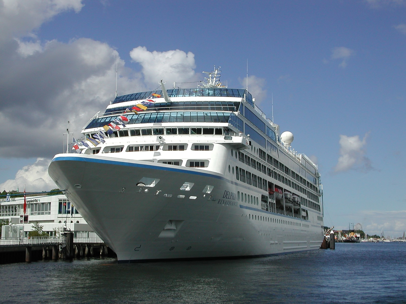 Kreuzfahrtschiff Delphin Renaissance im Kieler Hafen.